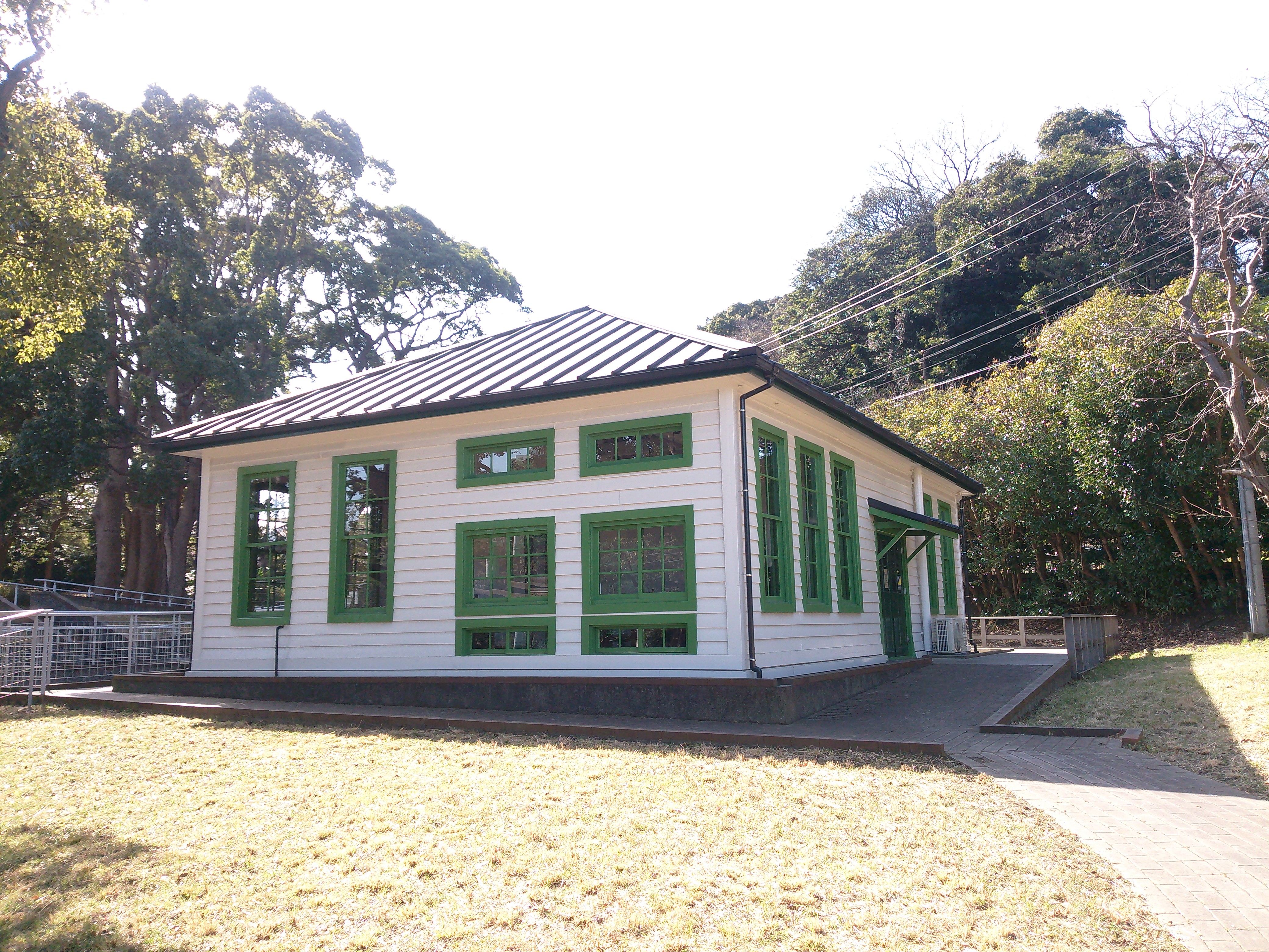 横浜市金沢区、長浜野口記念公園内にある、長浜ホール附属の旧横浜検疫所細菌検査室